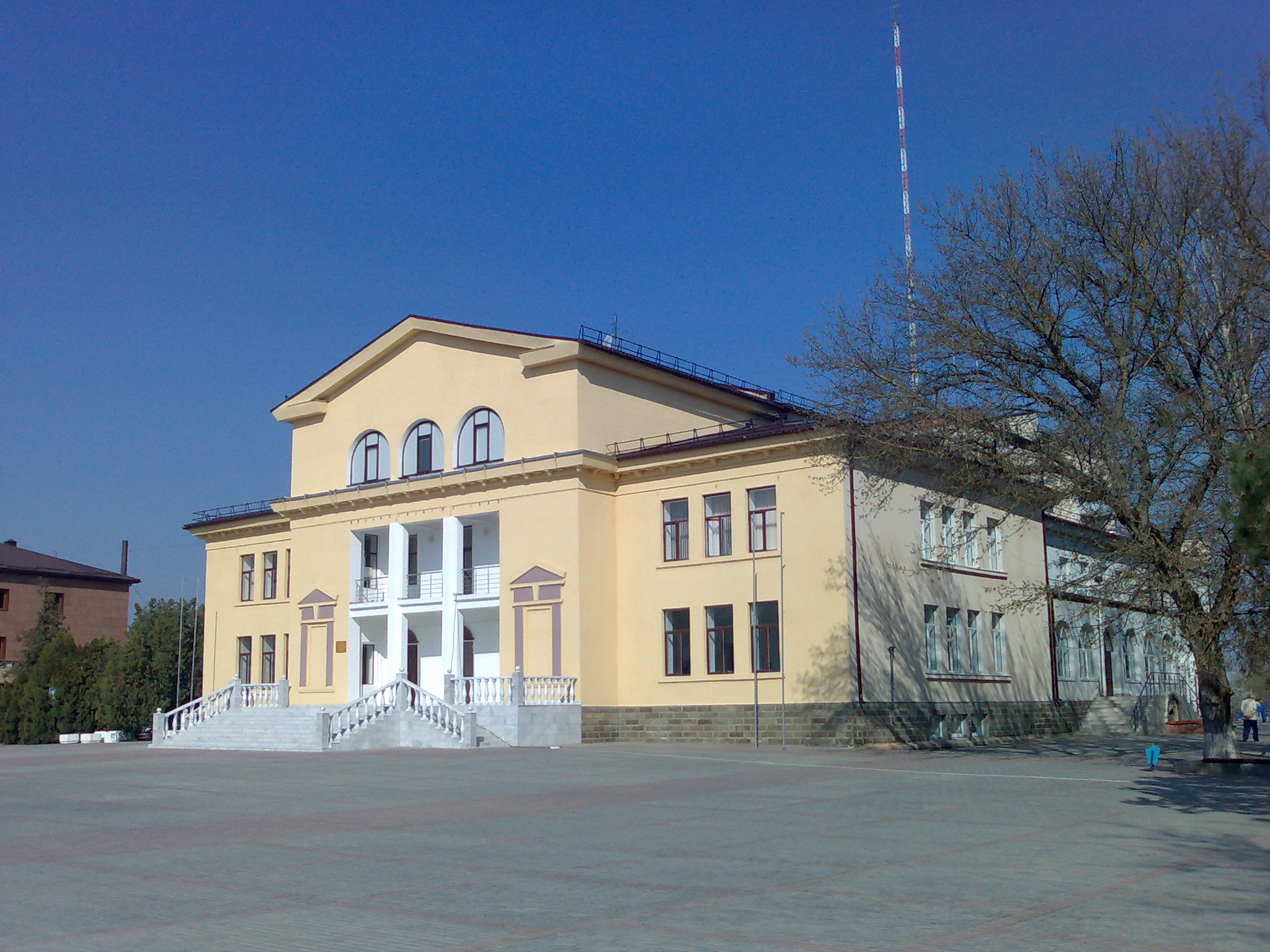 На фото изображён городской дом культуры, который находится в городе Славянске-на-Кубани